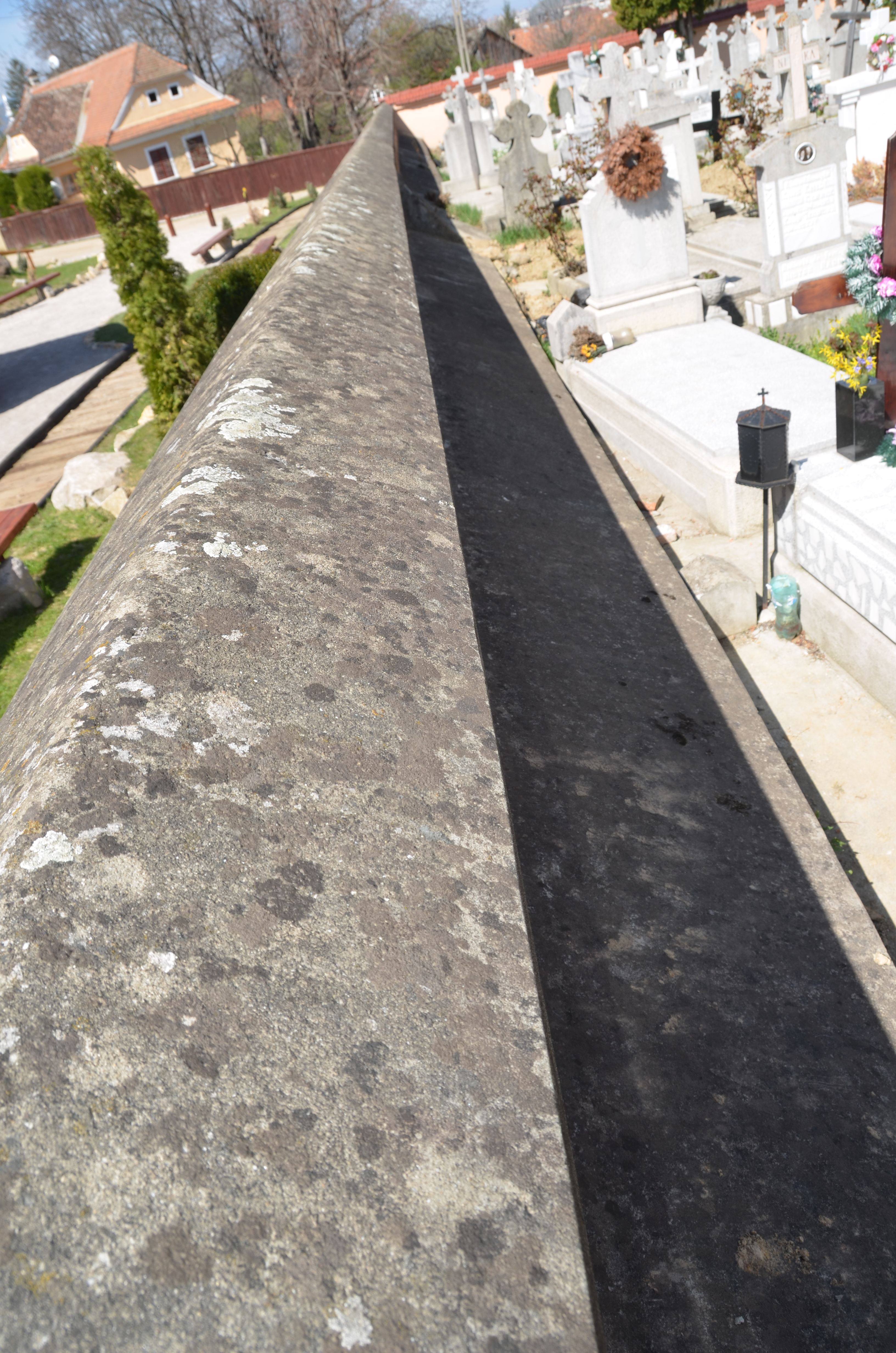 Zid de incintă -latura Sud, vedere din exterior, de sus 03